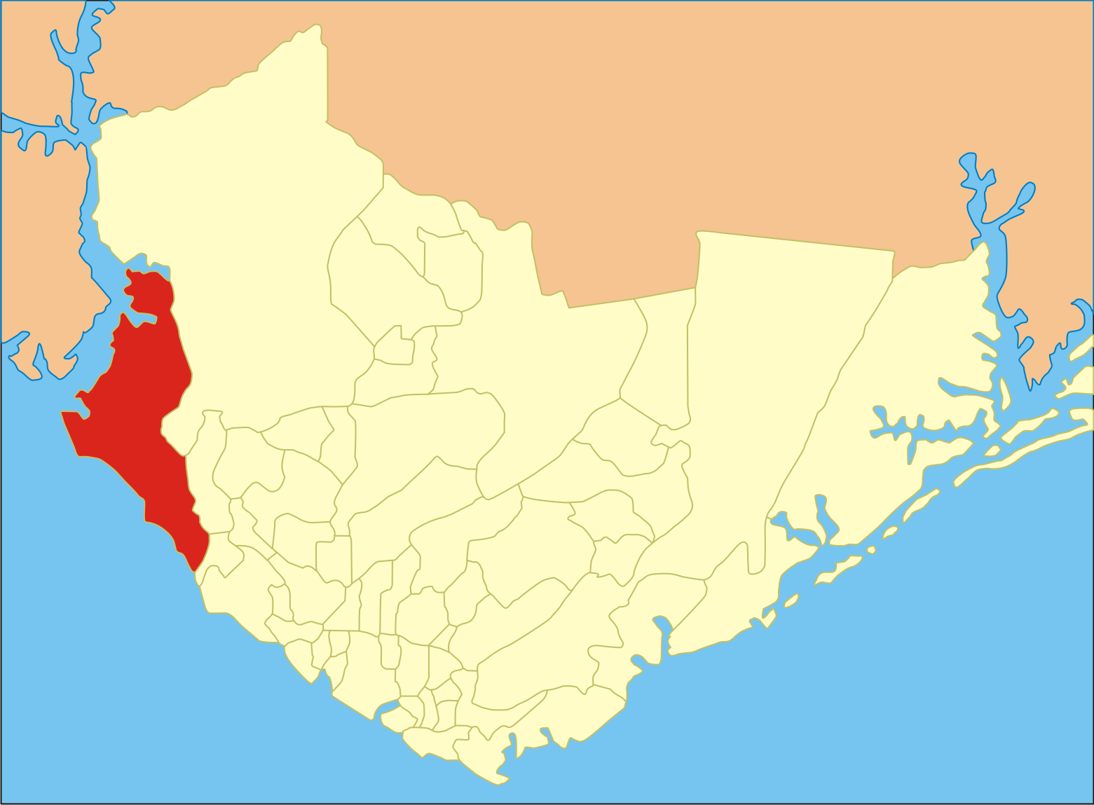 Localização do bairro em Manaus